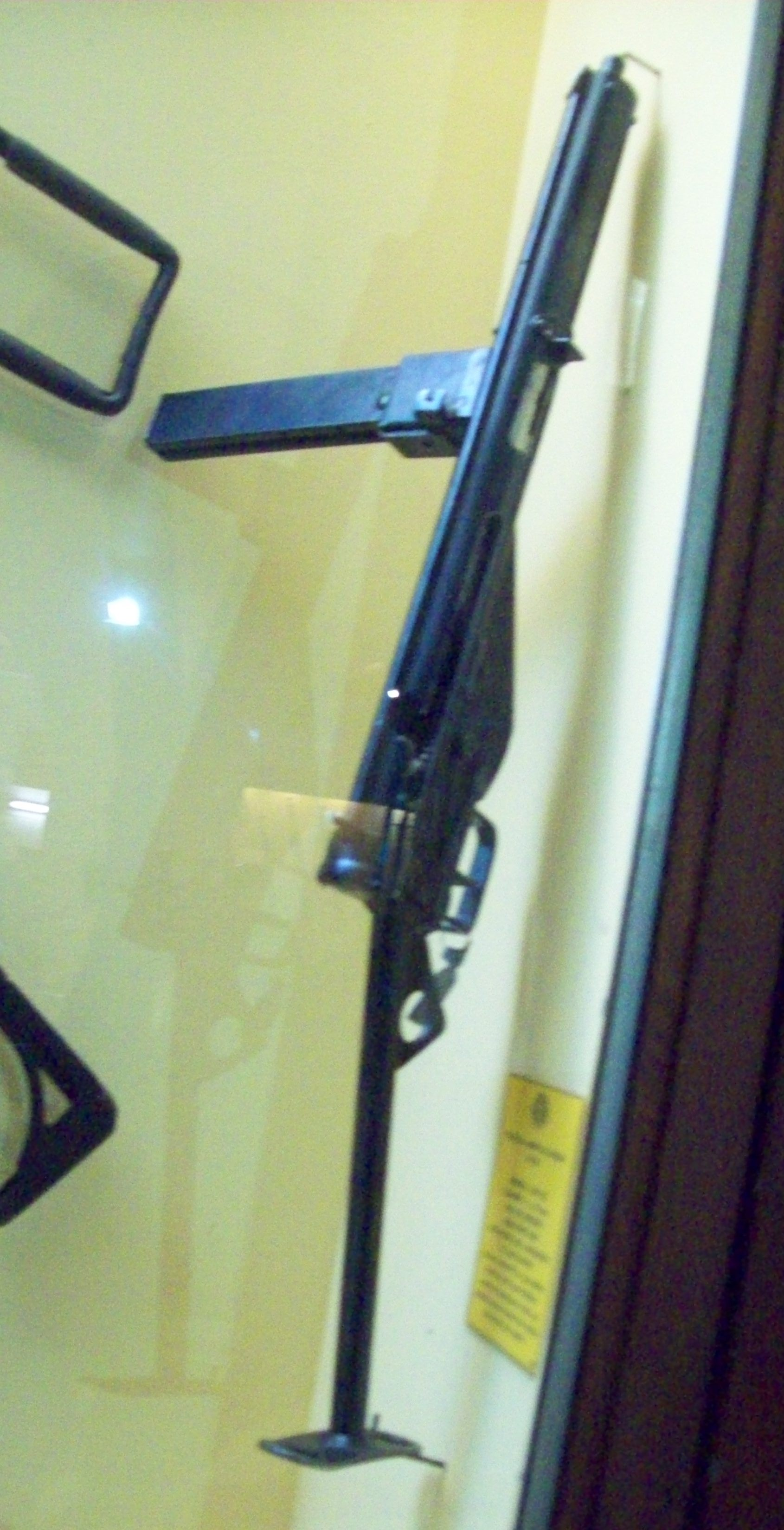 expuesto en el Museo de Armas, ciudad de Buenos Aires, Argentina 2014.